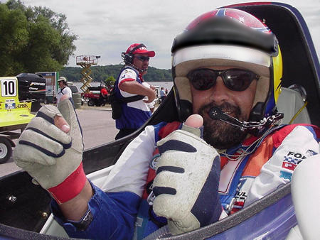 Carlos Kuri al desear suerte y ser lanzado para iniciar el día de competiciones. Lake Havasu, Az, USA.